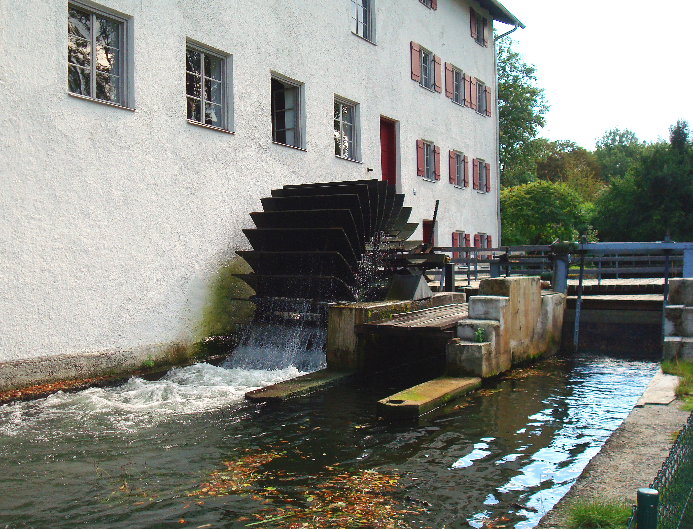 Krailling, Margaretenstraße 55, sog. Linner Mühle. Ehem. Getreidemühle der Linner KG, 1892 als dreigeschossiger Satteldachbau unter Verwendung von Teilen der Vorgängermühle auf dem Areal des früheren Hofmarkschlosses Krailling errichtet; mit technischer Ausstattung; zugehörig zwei hölzerne Schaufelmühlräder, Mühlbach und Wehre. This is a photograph of an architectural monument.